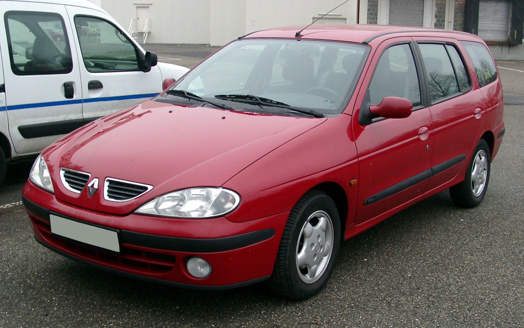 Renault Mégane Kombi